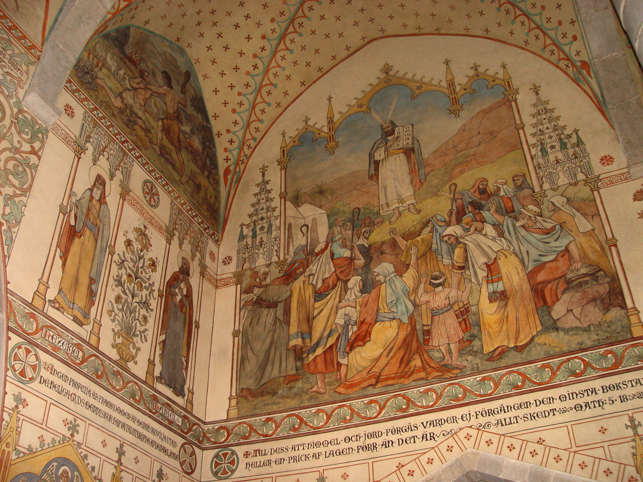 Dalhems kyrka (Gotland)